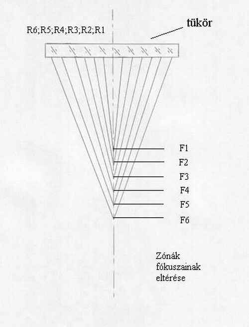 Fehér, álló téglalapon rajz, a függőleges tengely egy pontjából kiinduló, felfelé irányuló jobbra-balra tartó vonalak, a jobb alsó sarokban "Zónák fókuszainak eltérése" felirat látható.